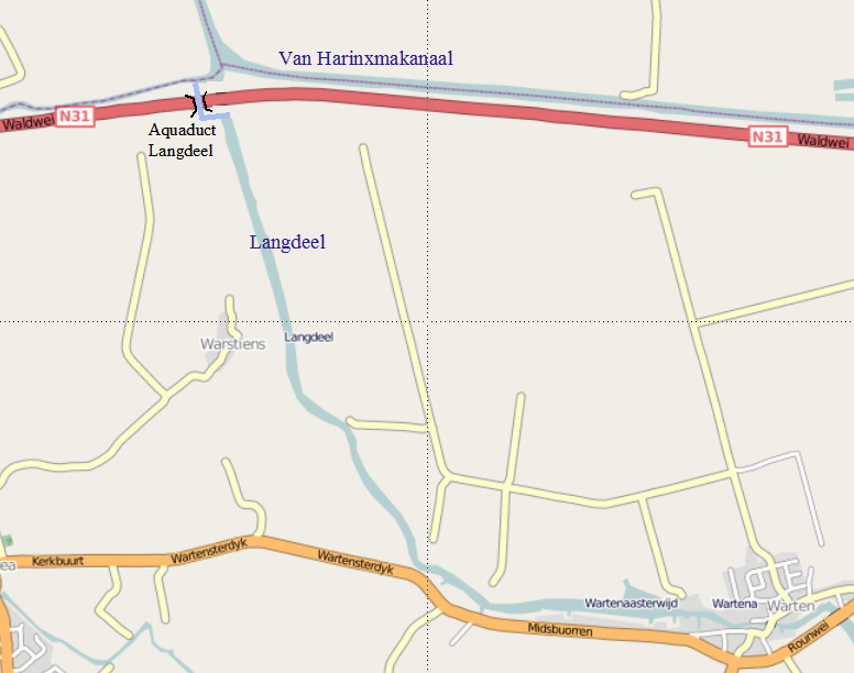 Langdeel, kanaal